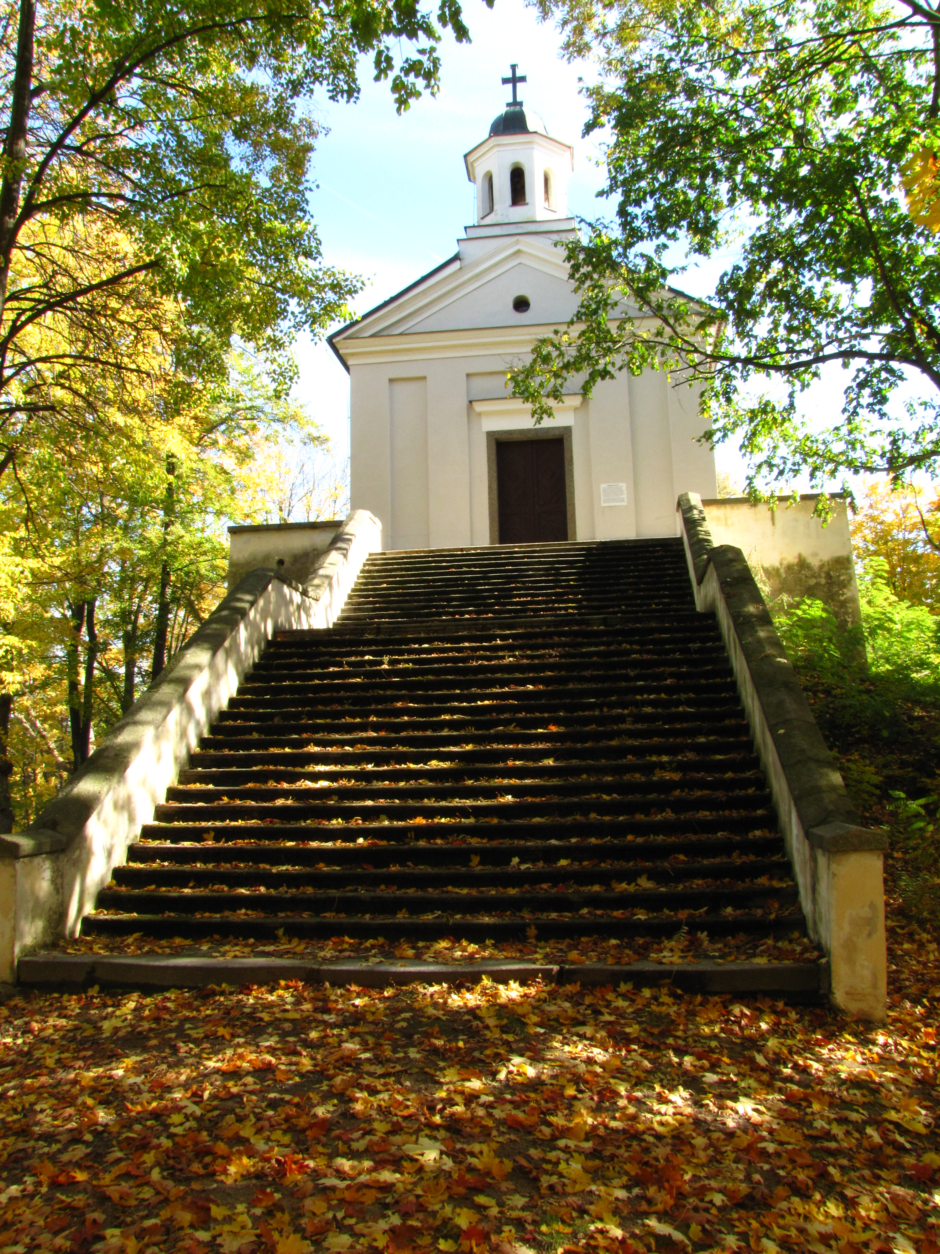 Kostel Nanebevzetí P. Marie (Mladá Vožice), Hradní vrch, Mladá Vožice